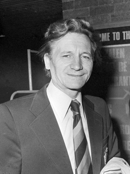 trainer Goethals.